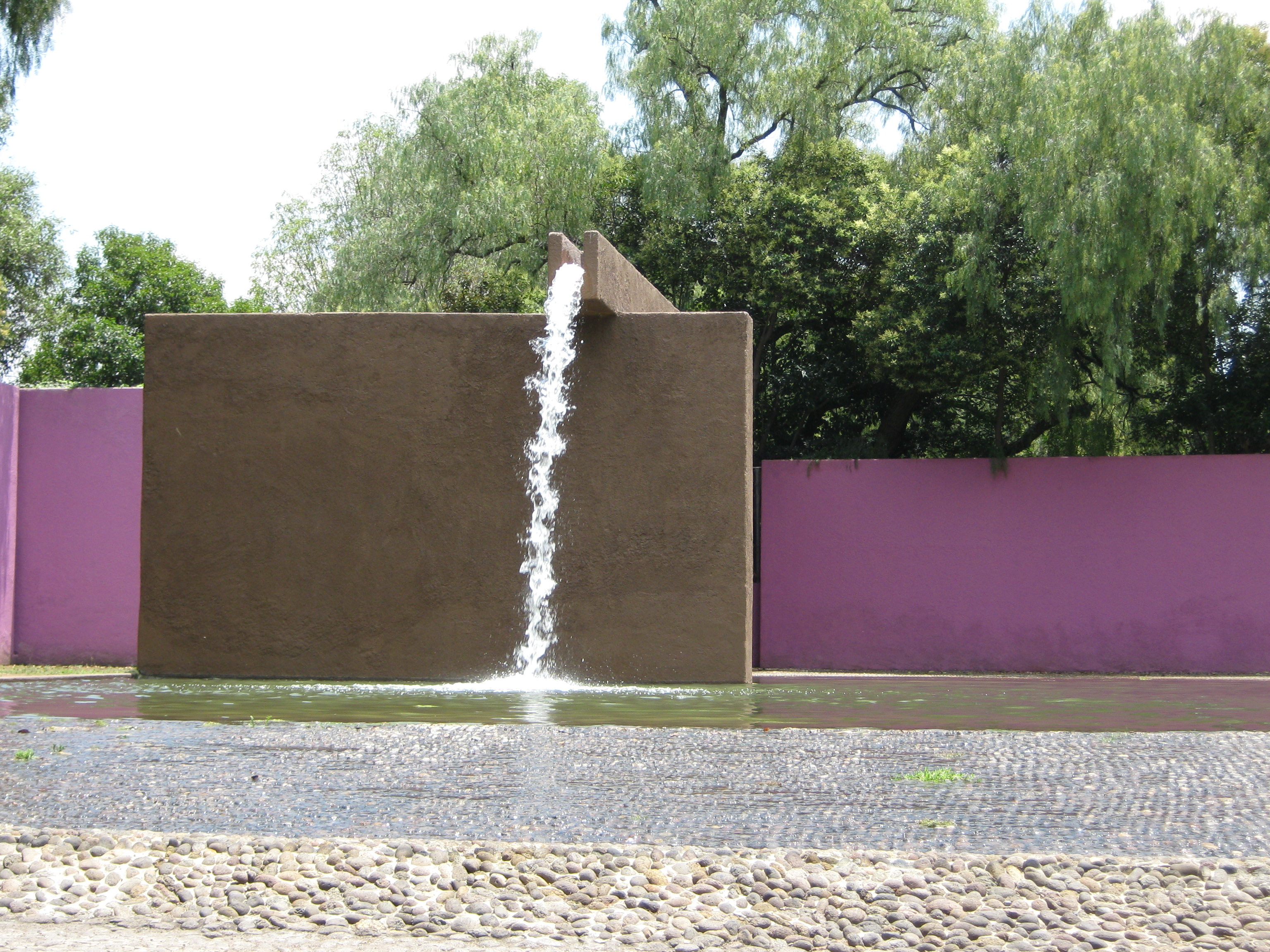 Fuente de Los Amantes, cerca de Mexico, D. F. Obra del Arquitecto Luis Barragán, Morfín.